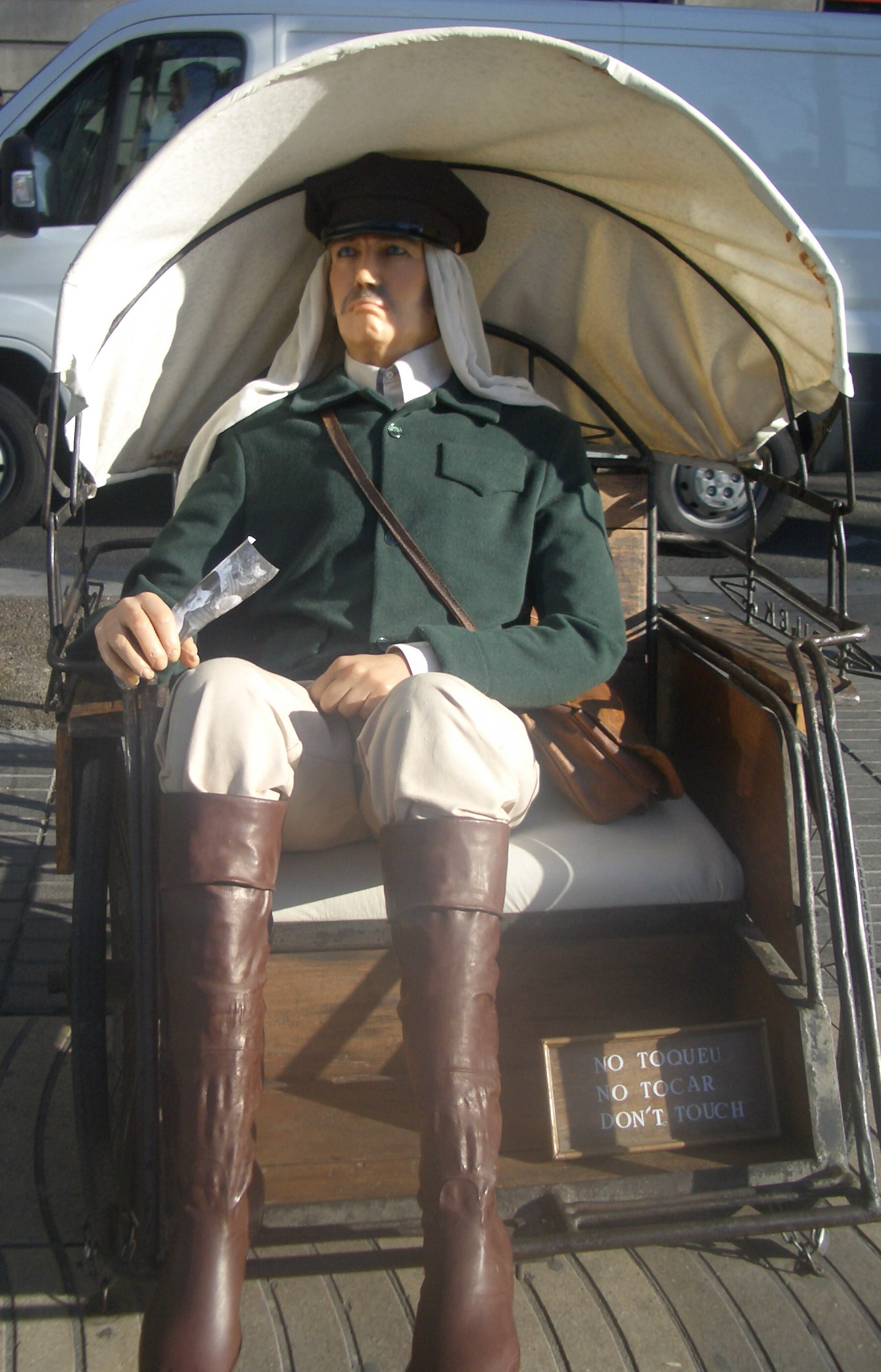 Figura de cera en las ramblas de Barcelona,España.